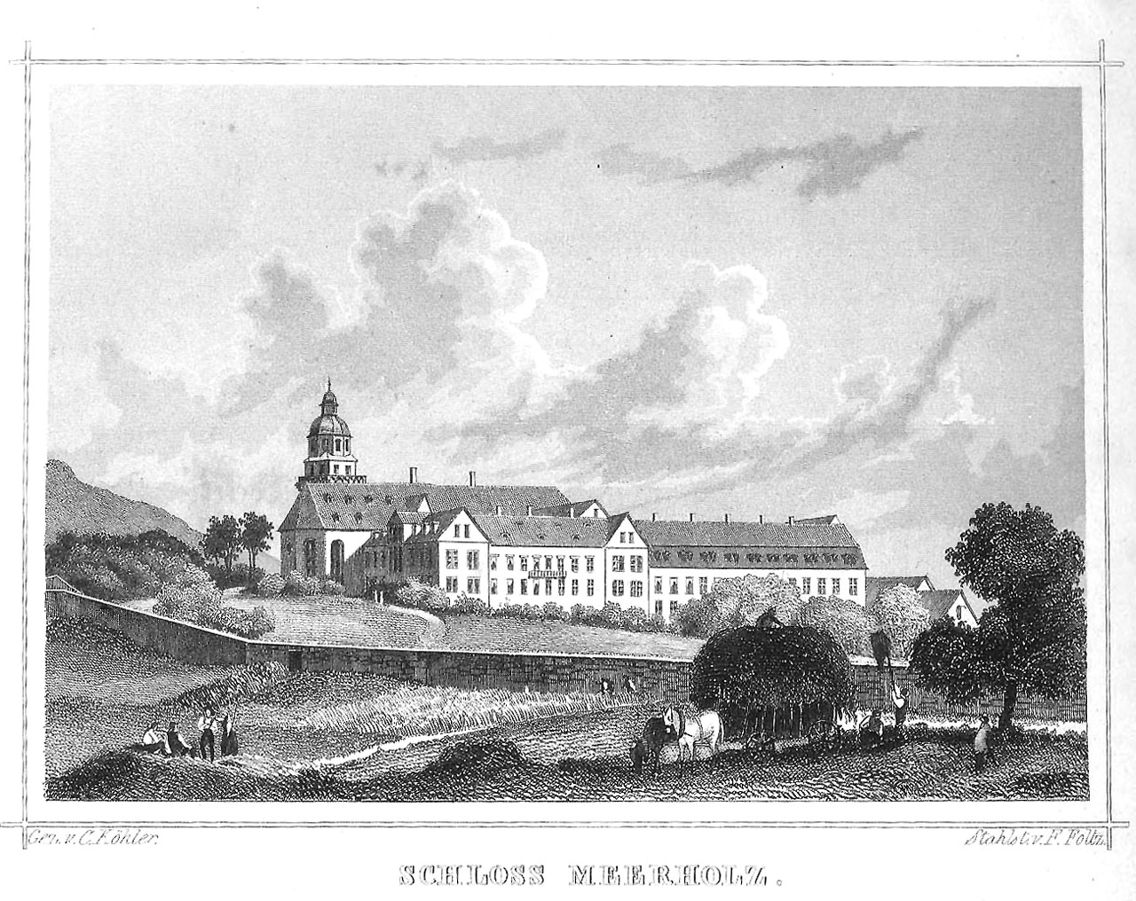 SCHLOSS MEERHOLZ., Gez. v. C. Köhler., Stahlst. v. F. Foltz. Original-Ansichten Kurfürstenthum Hessen (1850), S. 572.